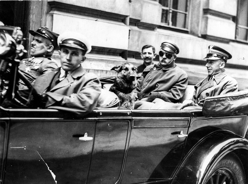 Wyjazd Józefa Piłsudskiego z Warszawy do Sulejówka 1929/07/11 Na tylnym siedzeniu samochodu siedzą Józef Piłsudski (po lewej stronie, w goglach), mjr Konrad Zembrzuski (z prawej) i pies "Pies". Samochód prowadzi szofer Zygmunt Malinowski, obok niego siedzi wachmistrz Walenty Wójcik.